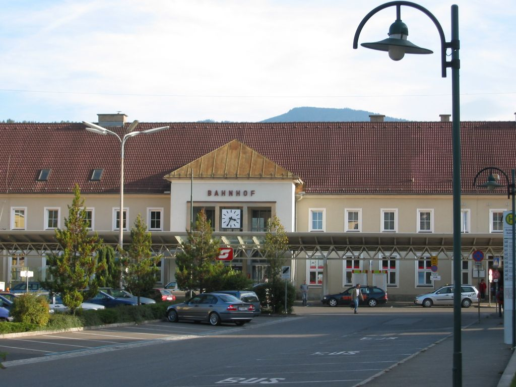 Knittelfeld Bahnhof